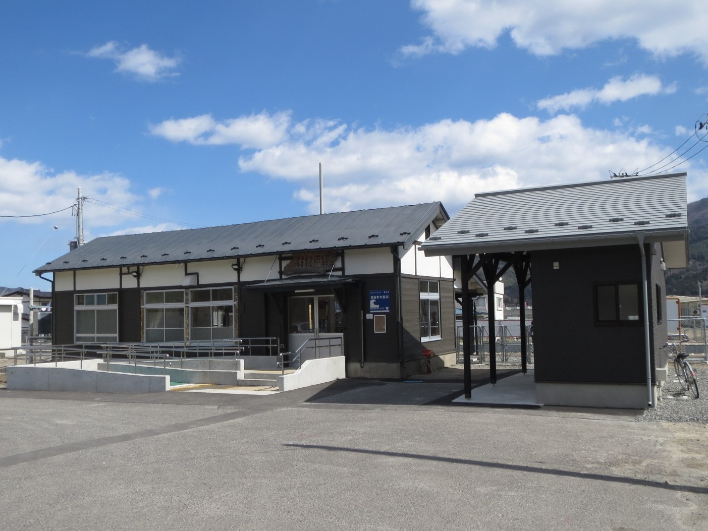 復旧直後の津軽石駅 Canon IXY 3